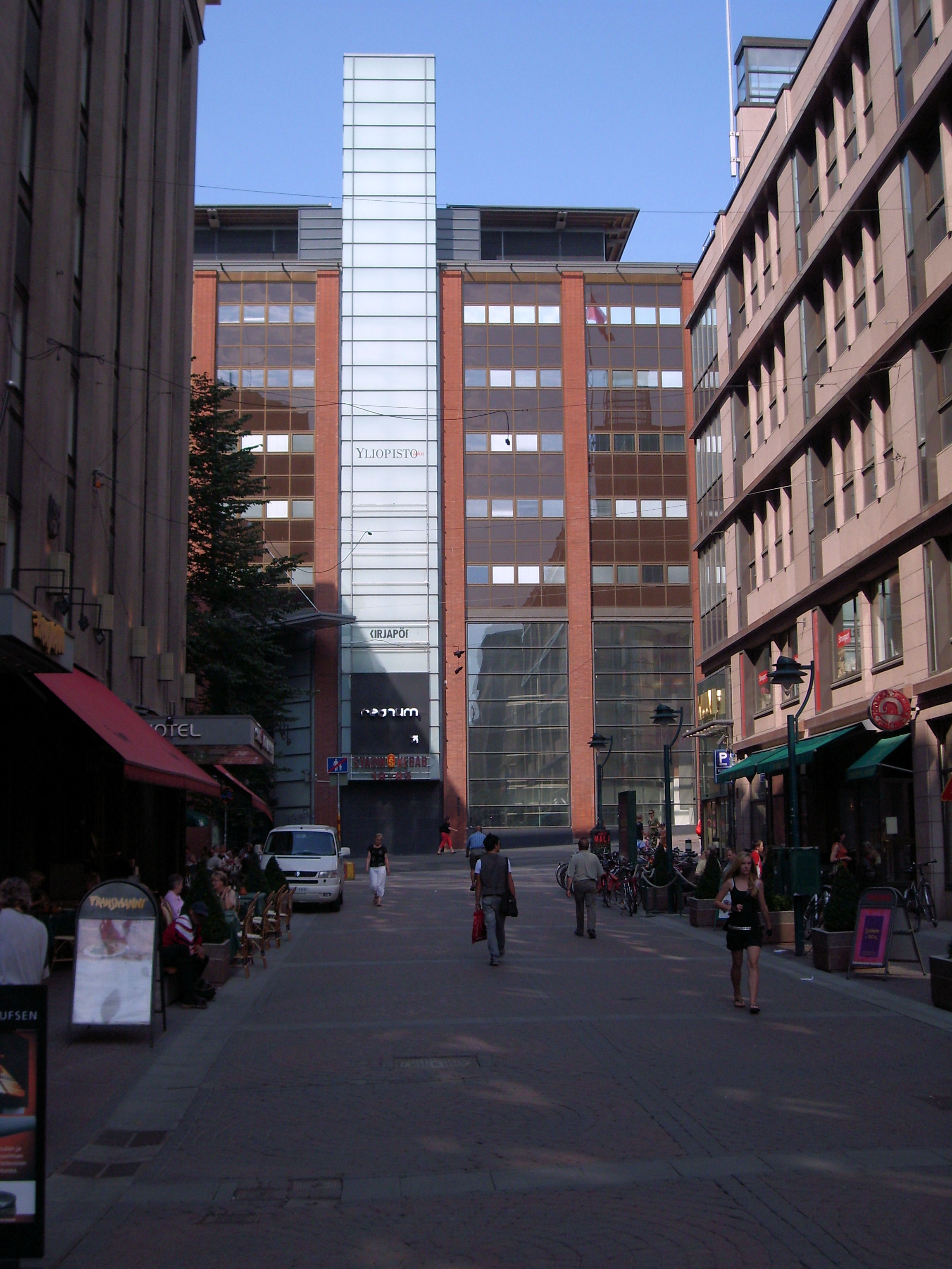 Heimolan talo, Helsinki, Finland